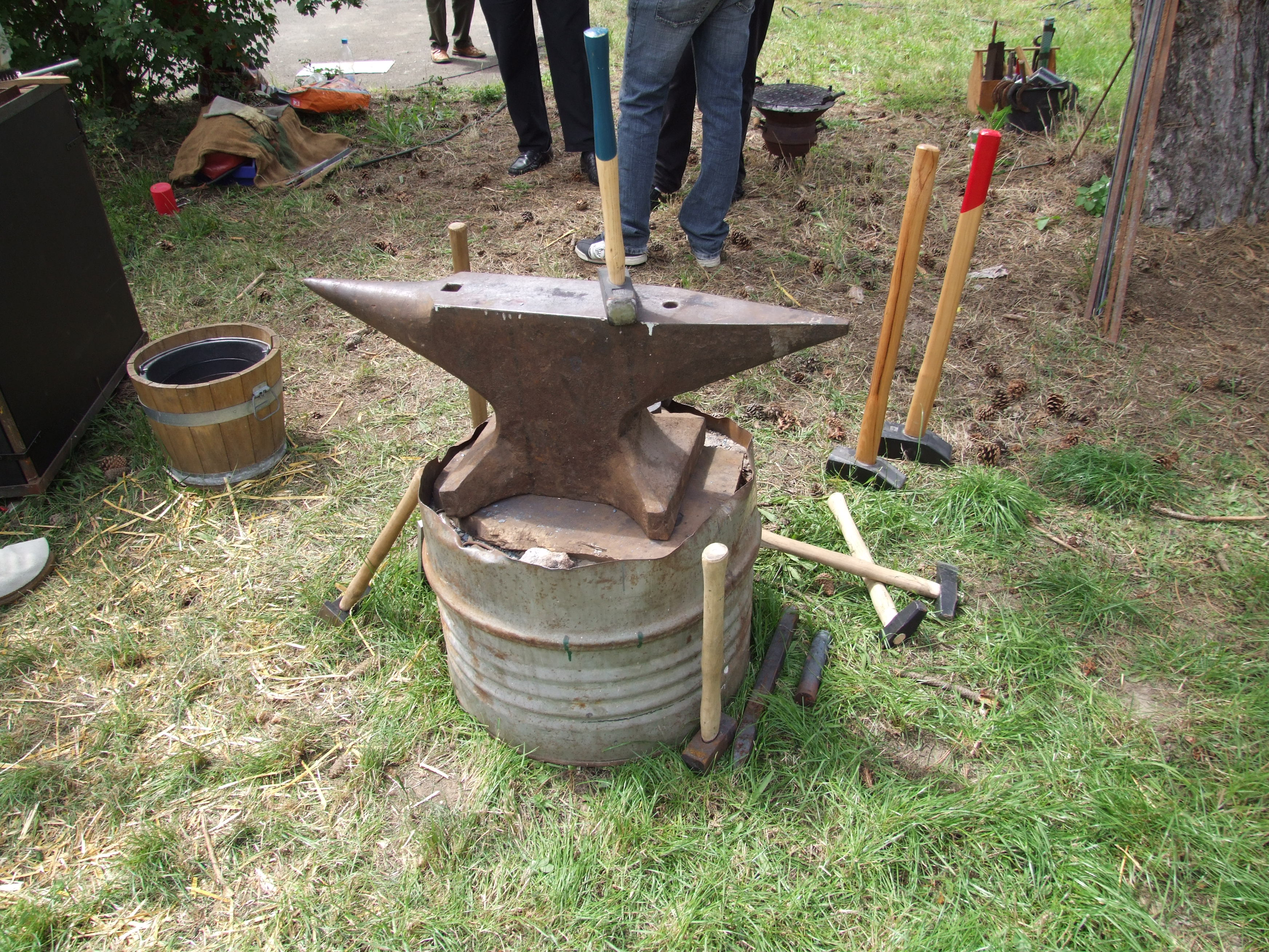 Amboß mit Hämmern eines Hufschmiedes, Anvil of a farrier, hammers